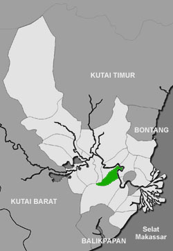 Tenggarong, Kutai Kartanegara county, East Kalimantan province, Indonesia